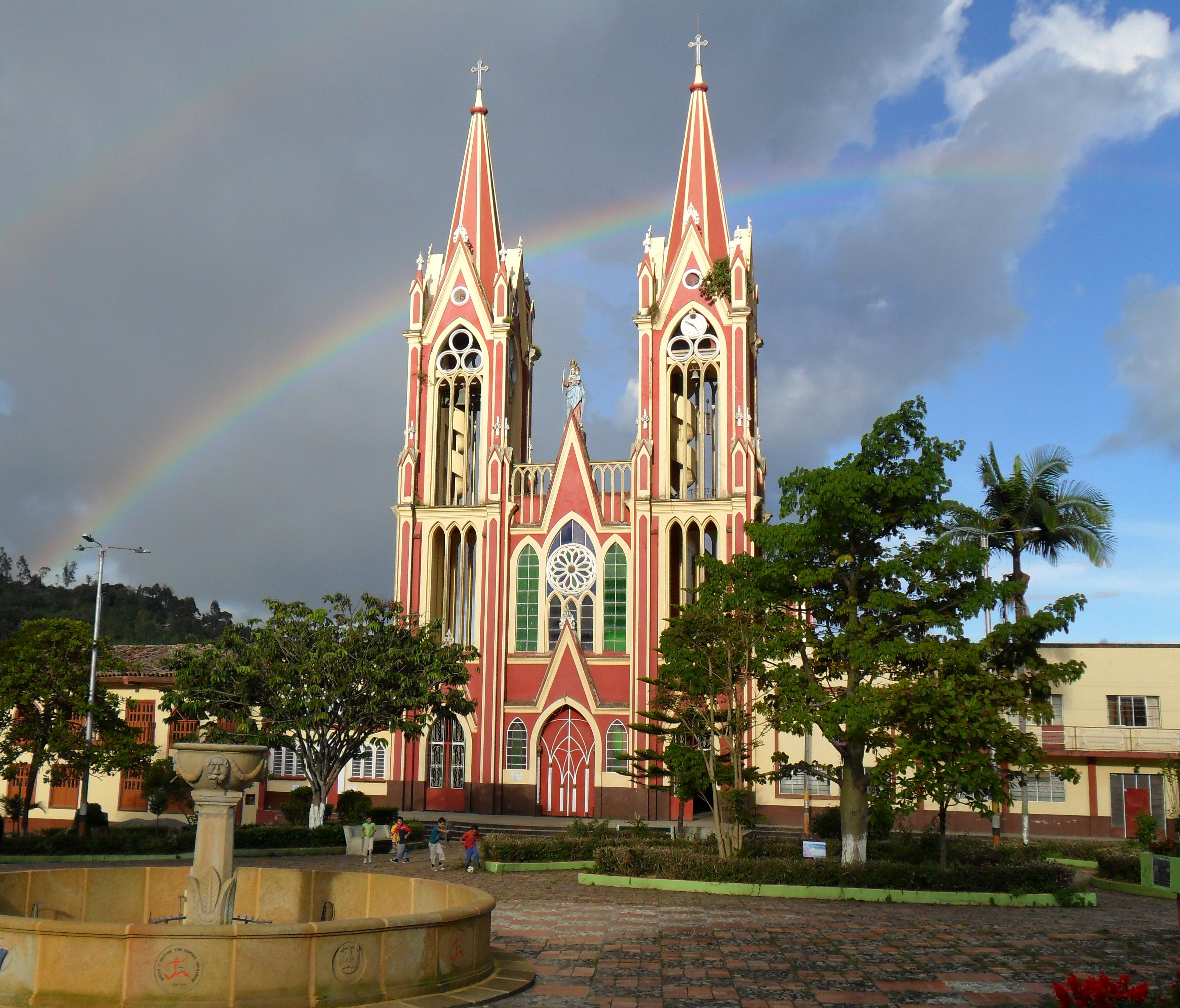 Cortesía Libardo Rincón